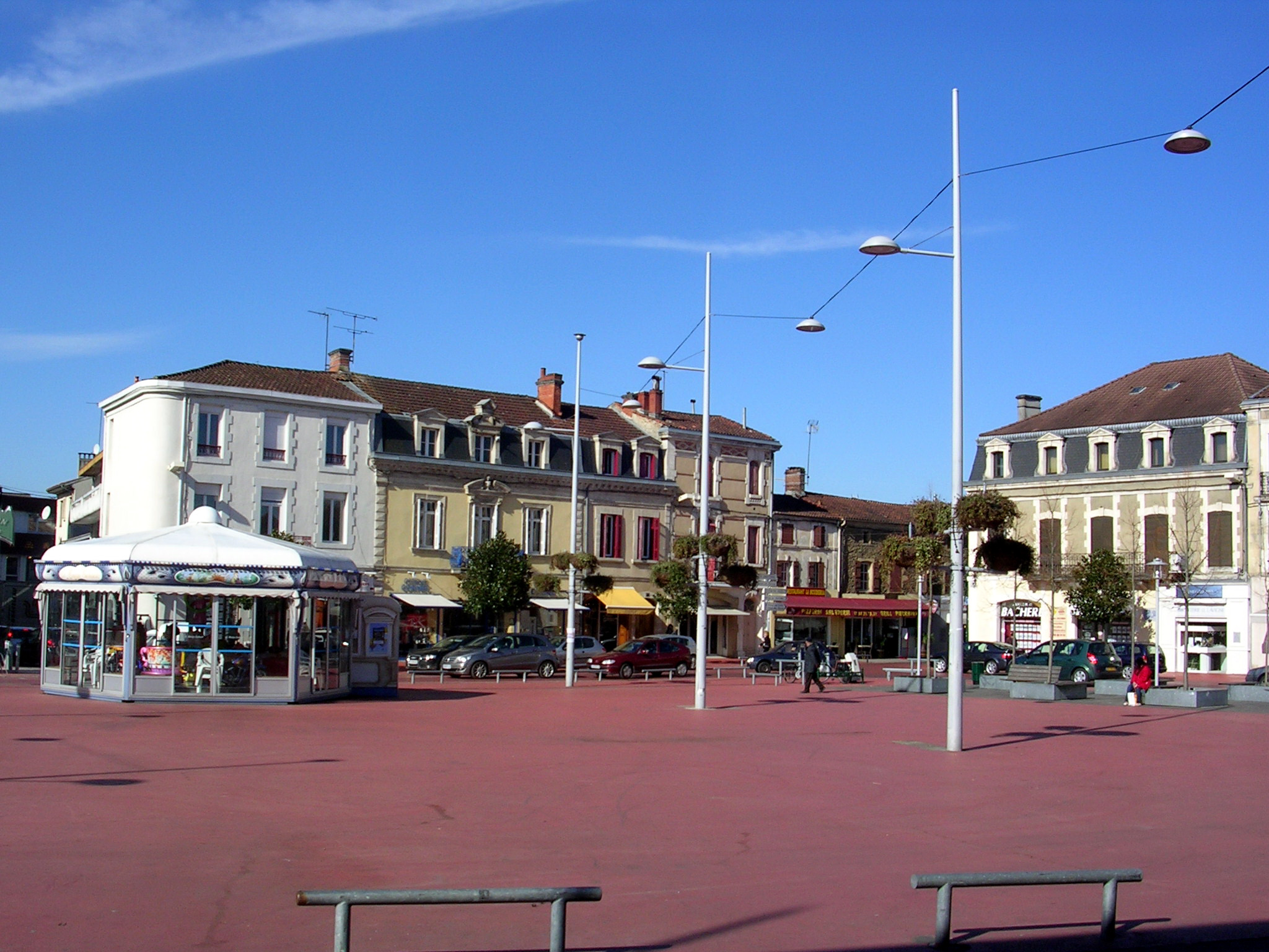 Place Saint-Roch de Mont-de-Marsan. Le sol y est peint en rouge, en souvenir des arènes en bois qui s'y montaient le temps des corridas, avant la construction en dur des arènes du Plumaçon.